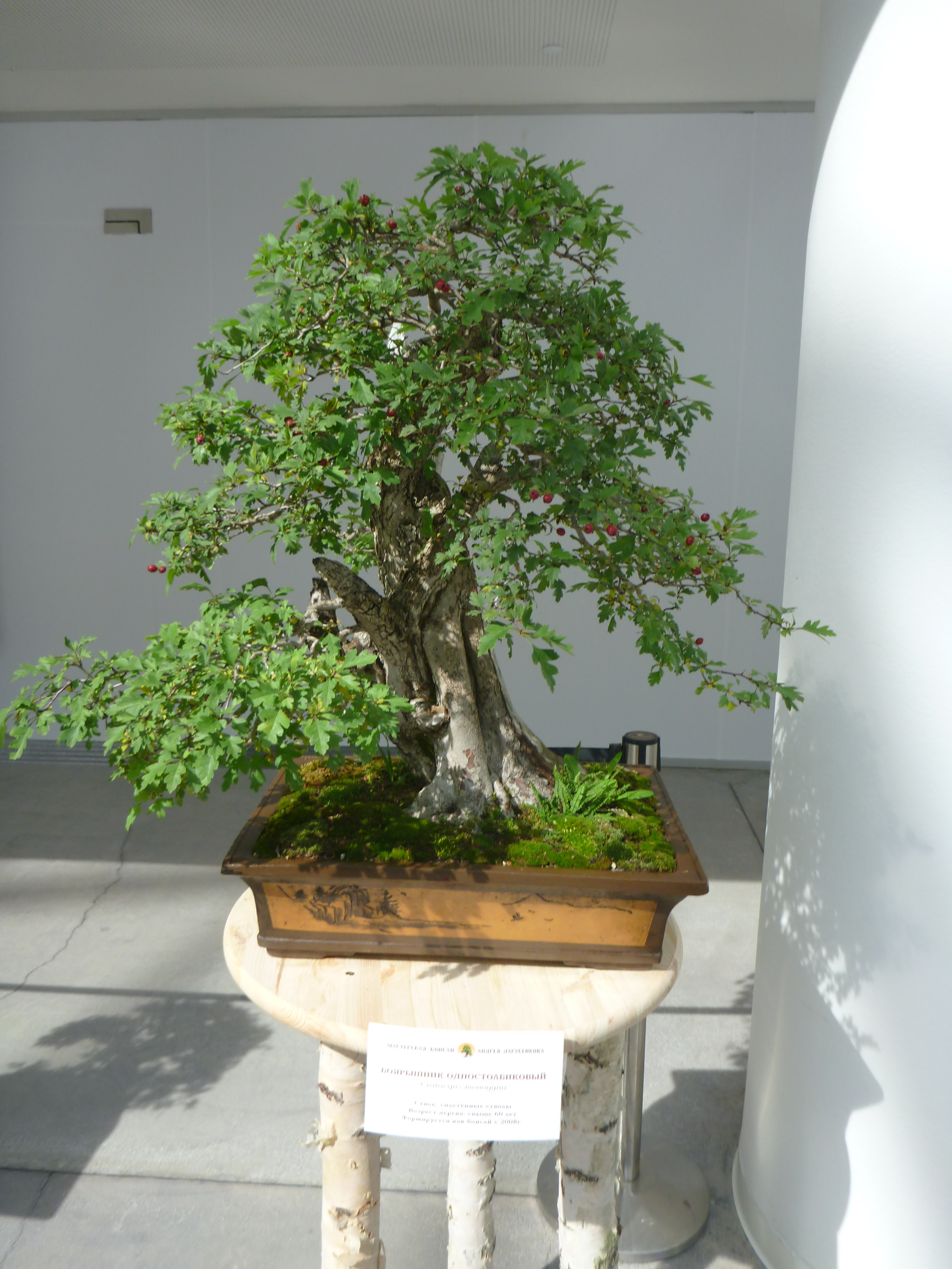 Боярышник одностолбиковый бонсай в Ельцин-центре 2019 год